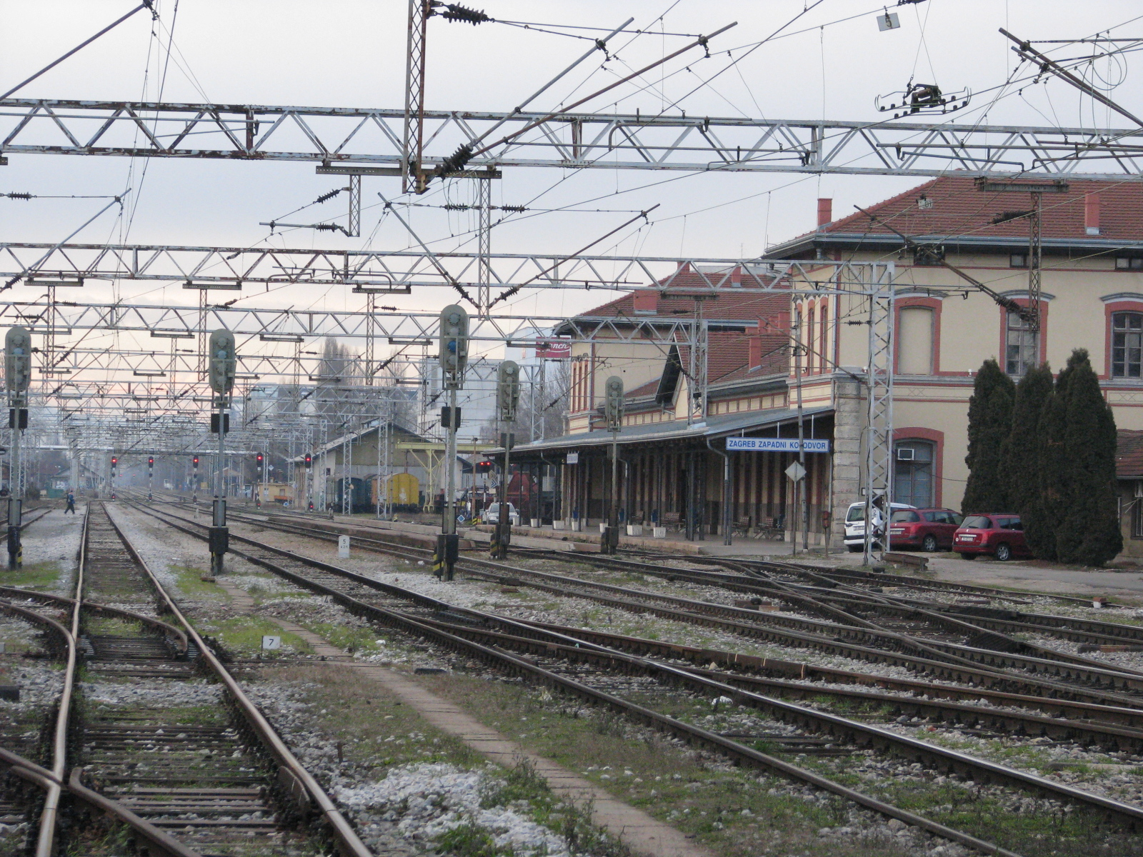 Zagreb Zapadni kolodvor